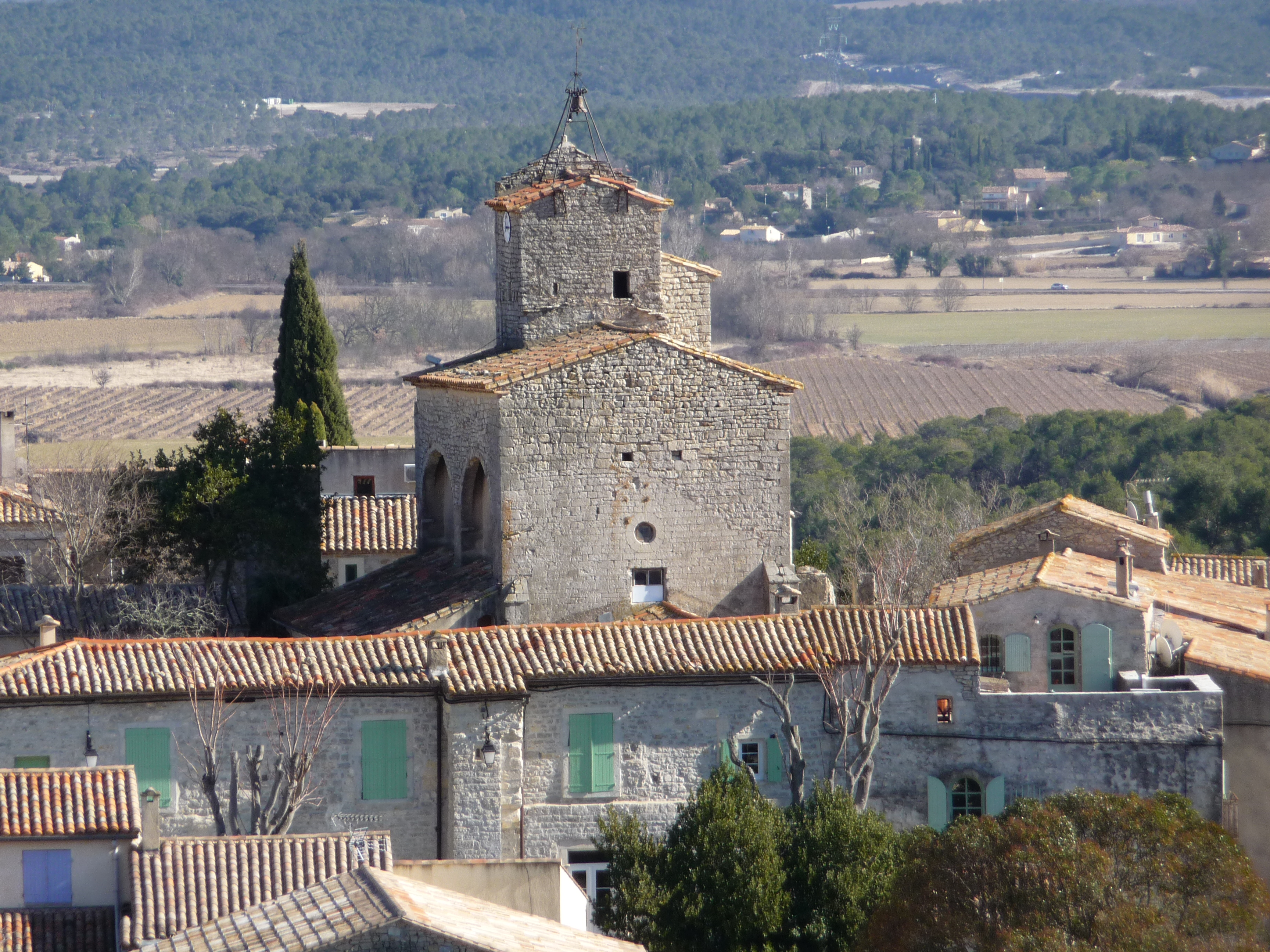 Església de la Nativitat de Sant Joan Baptista de Sant Joan de Cuculas .